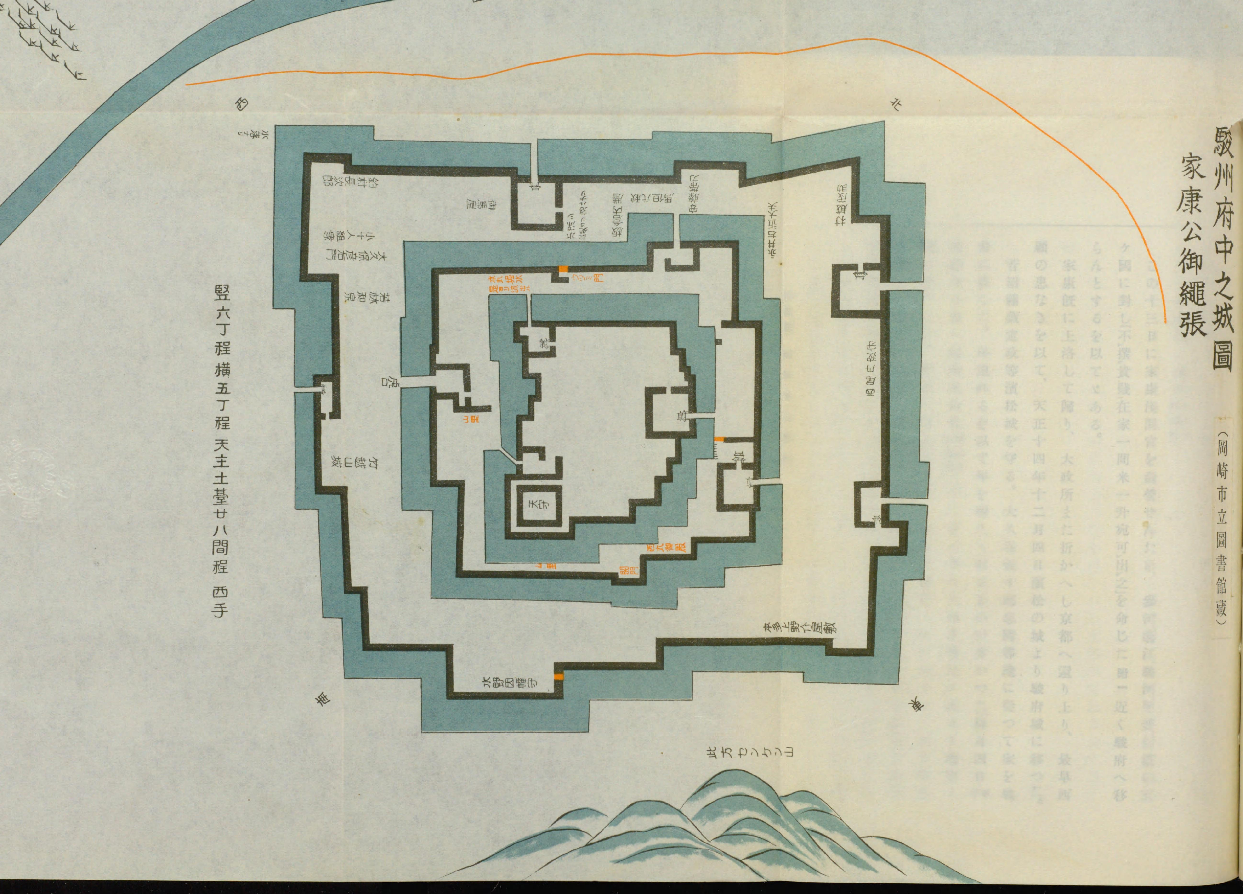 駿州府中之城圖 家康公御繩張 城郭図